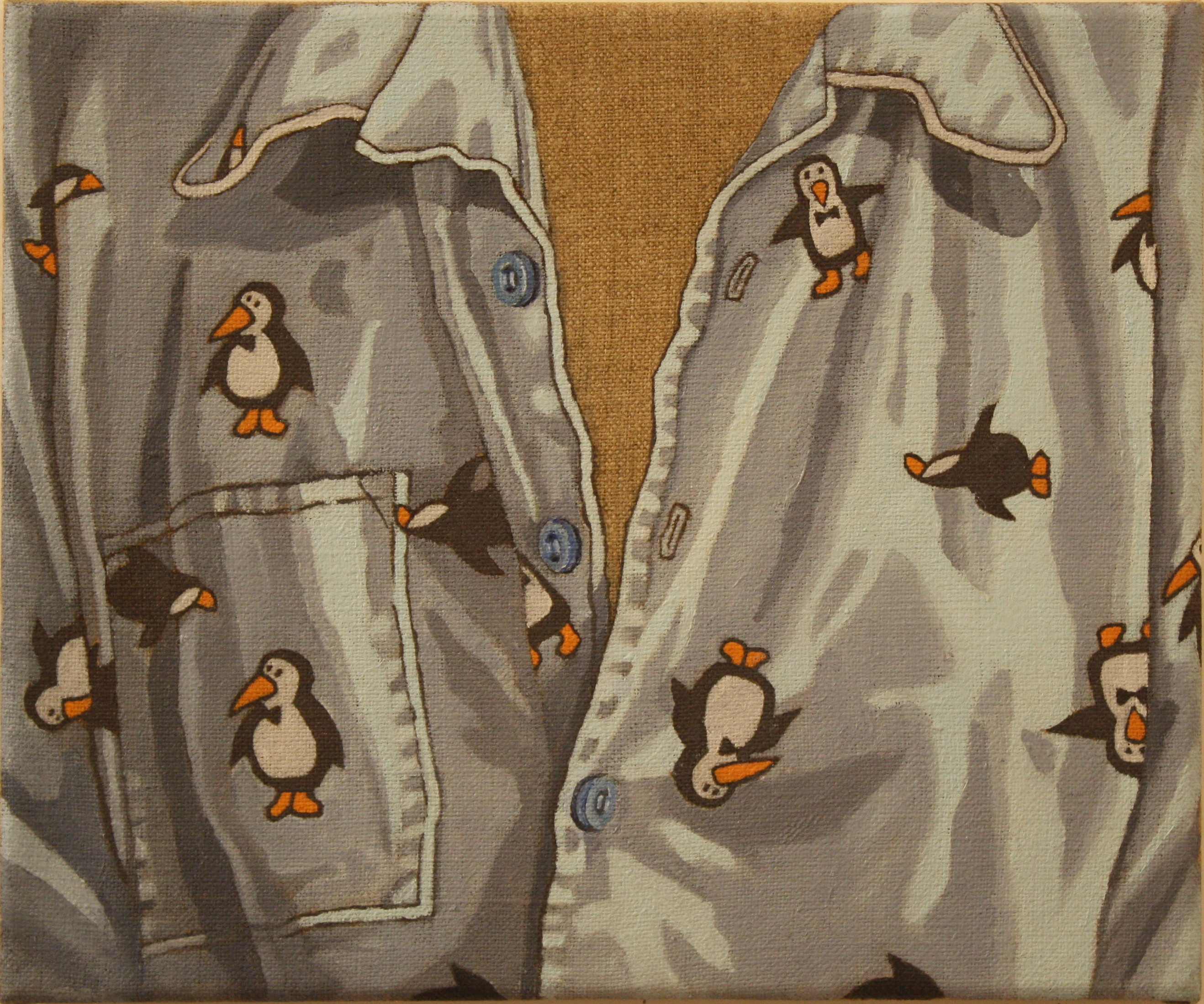 Nomi Tannhauser, Untitled no 9